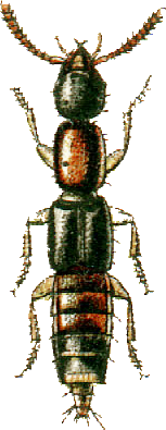 This file has been extracted from another file: Jacobs14.jpg